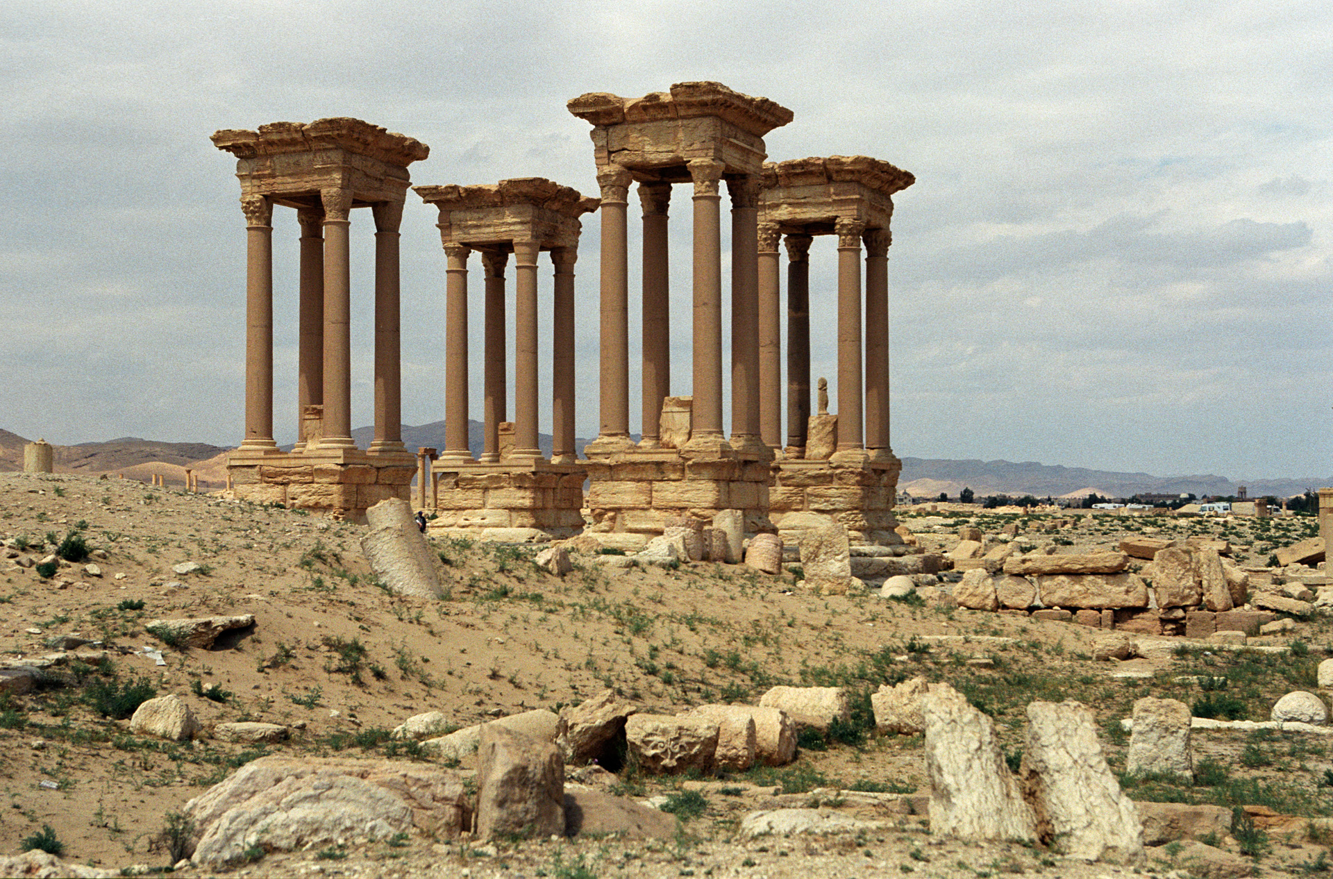 Palmyra, tetrapylon